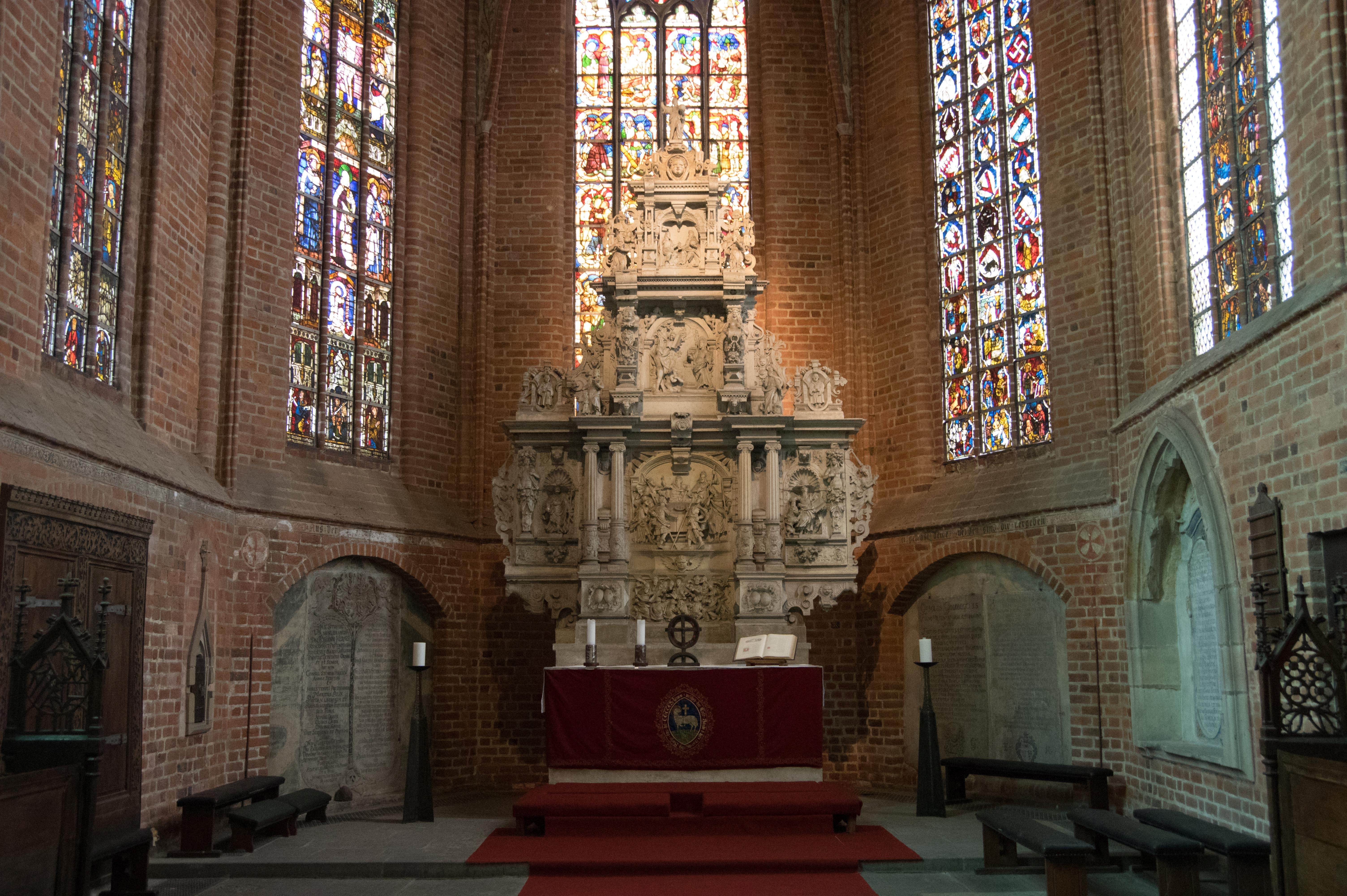 Stendal in Sachsen-Anhalt. Die Jacobikirche steht unter Denkmalschutz.